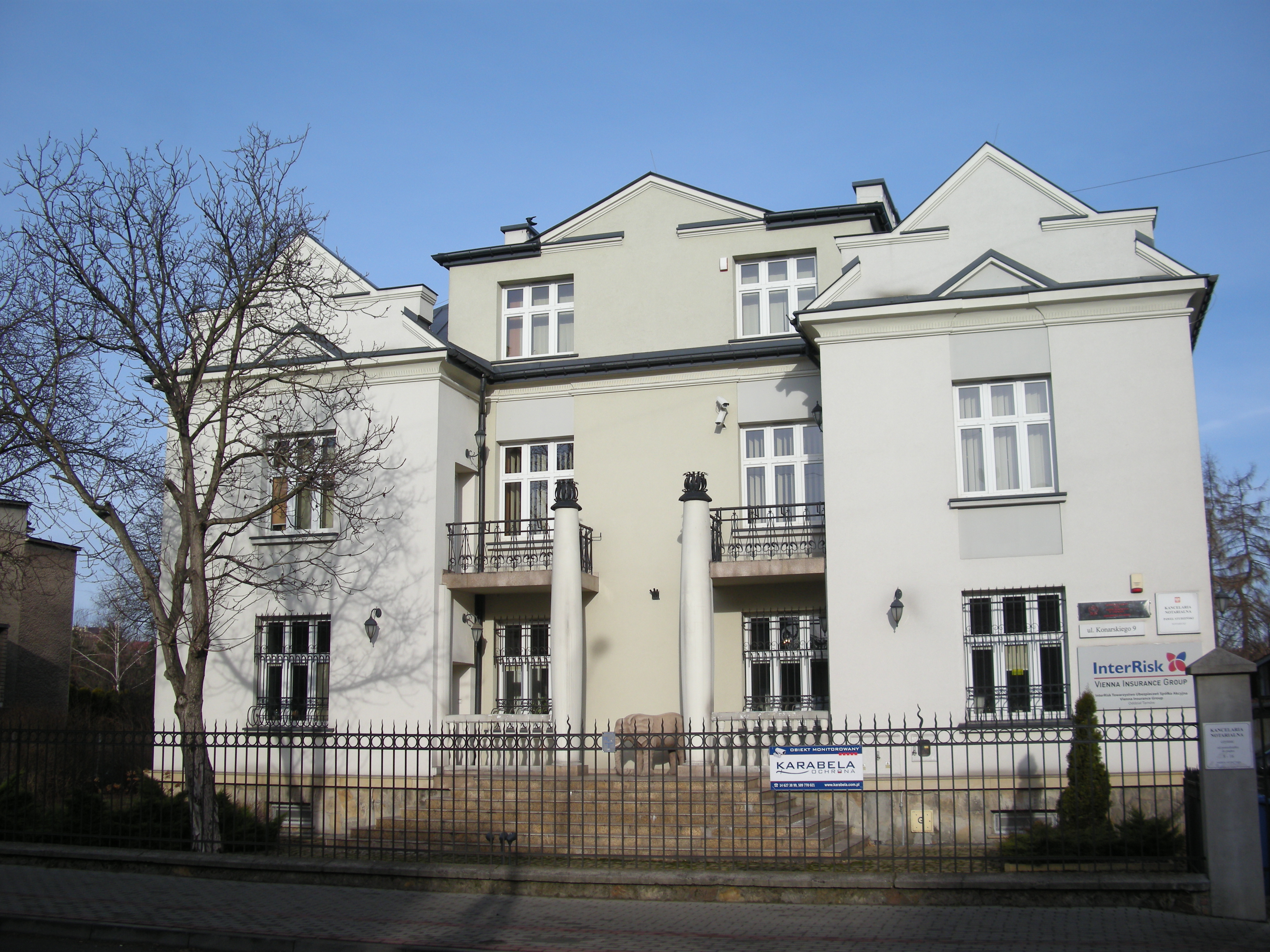 Willa z 20-lecia międzywojennego przy ul. Konarskiego